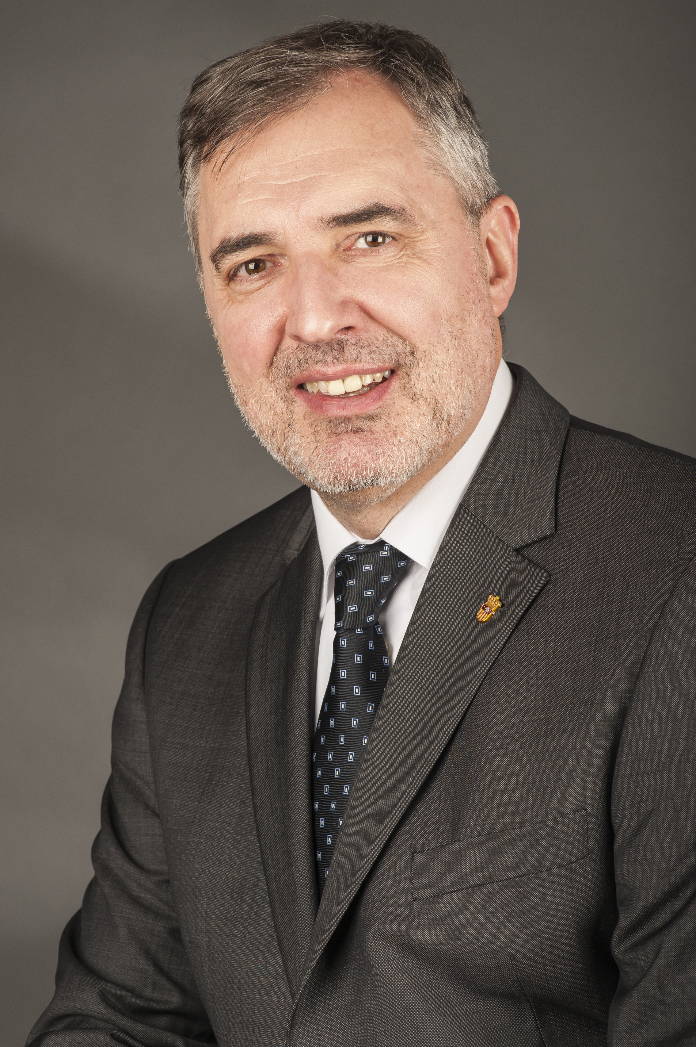 Erwald Stadler